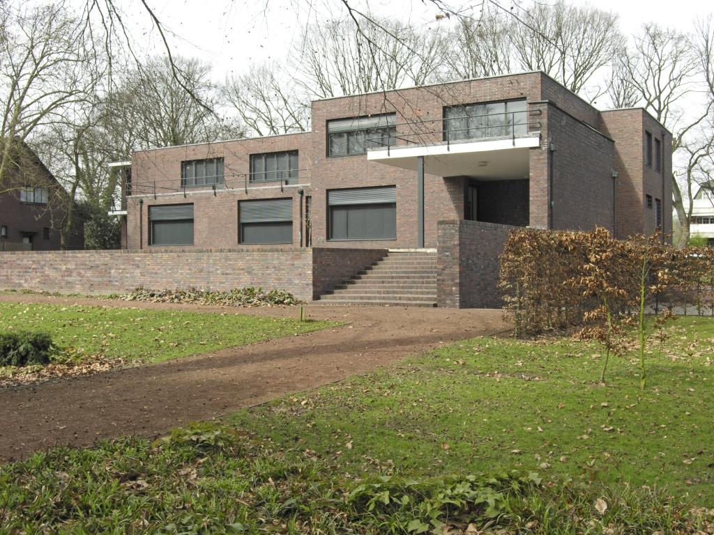 Haus Lange, Krefeld, Rückseite von Südost